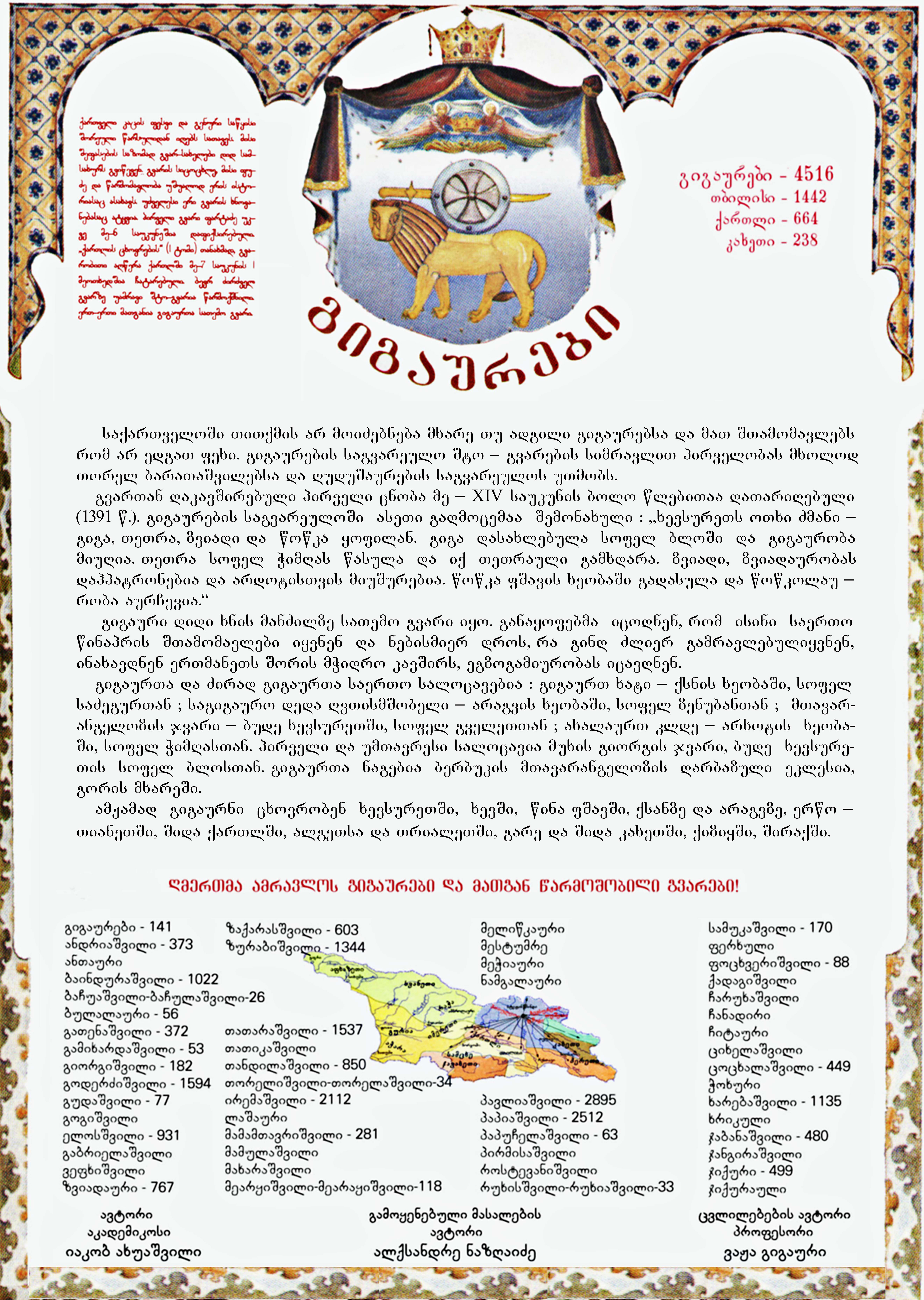 გიგაურების საგვარეულო გერბი